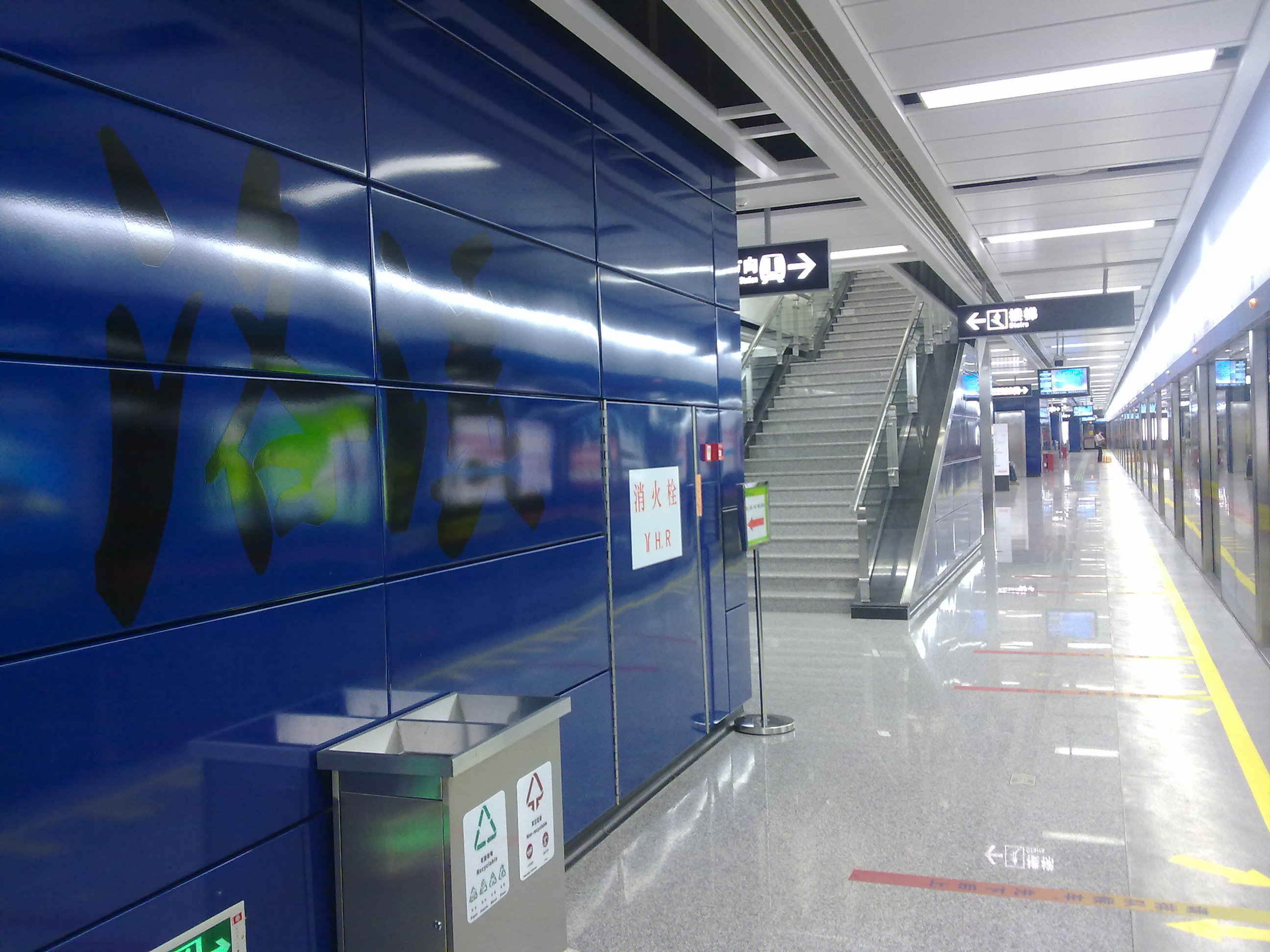 廣州地鐵洛溪站站台